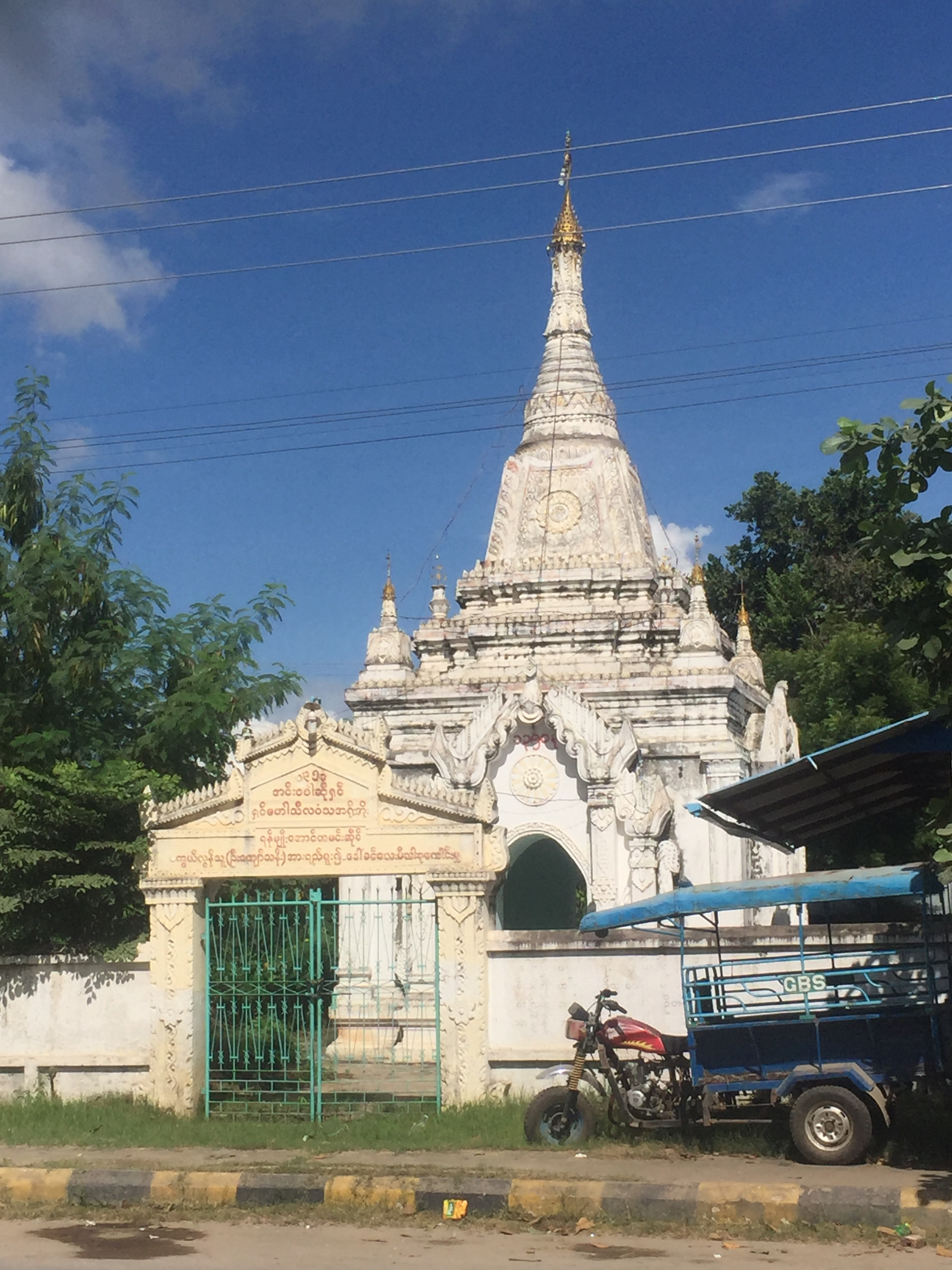 မြန်မာဘာသာ: စစ်ကိုင်း ဆင်များရှင်ဘုရားအနီးရှိ ရှင်မဟာသီလဝံသ အရိုးအိုးဂူဘုရား